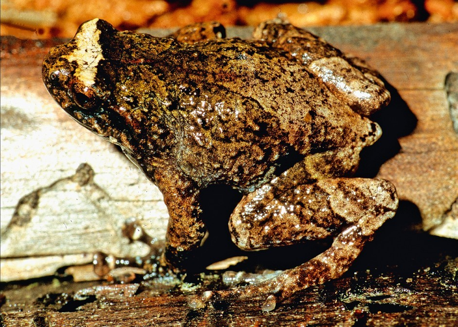 Anodonthyla vallaniHolotype specimen ZSM 86/2005 in dorsolateral view